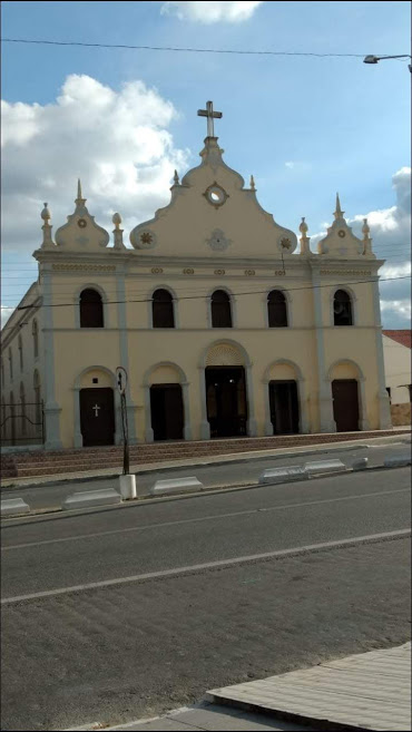 Capela(hoje Igreja Matriz Nossa Senhora Santa Ana) onde surgiu a cidade de Soledade.